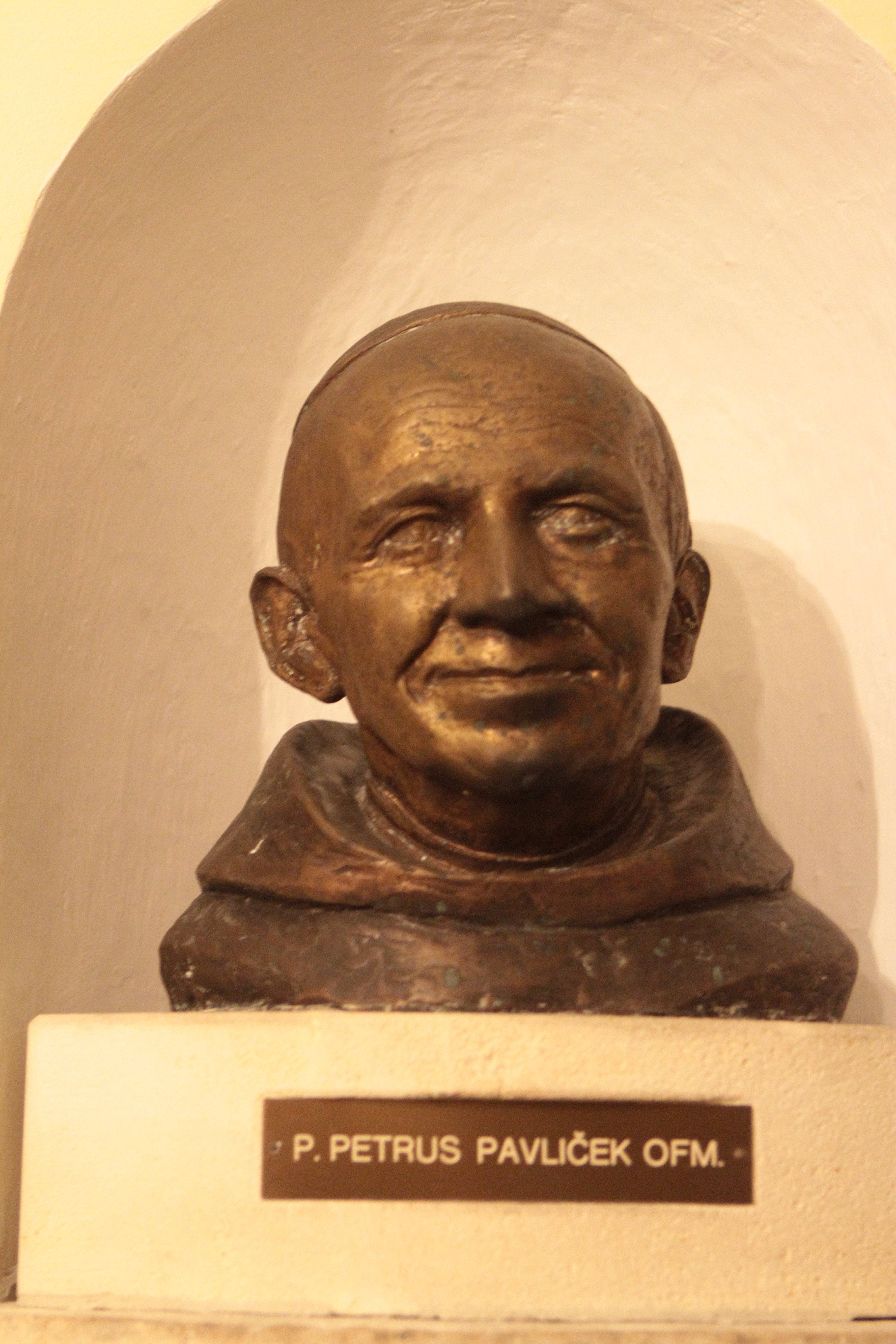 Franziskanerkirche hl. Hieronymus und -kloster